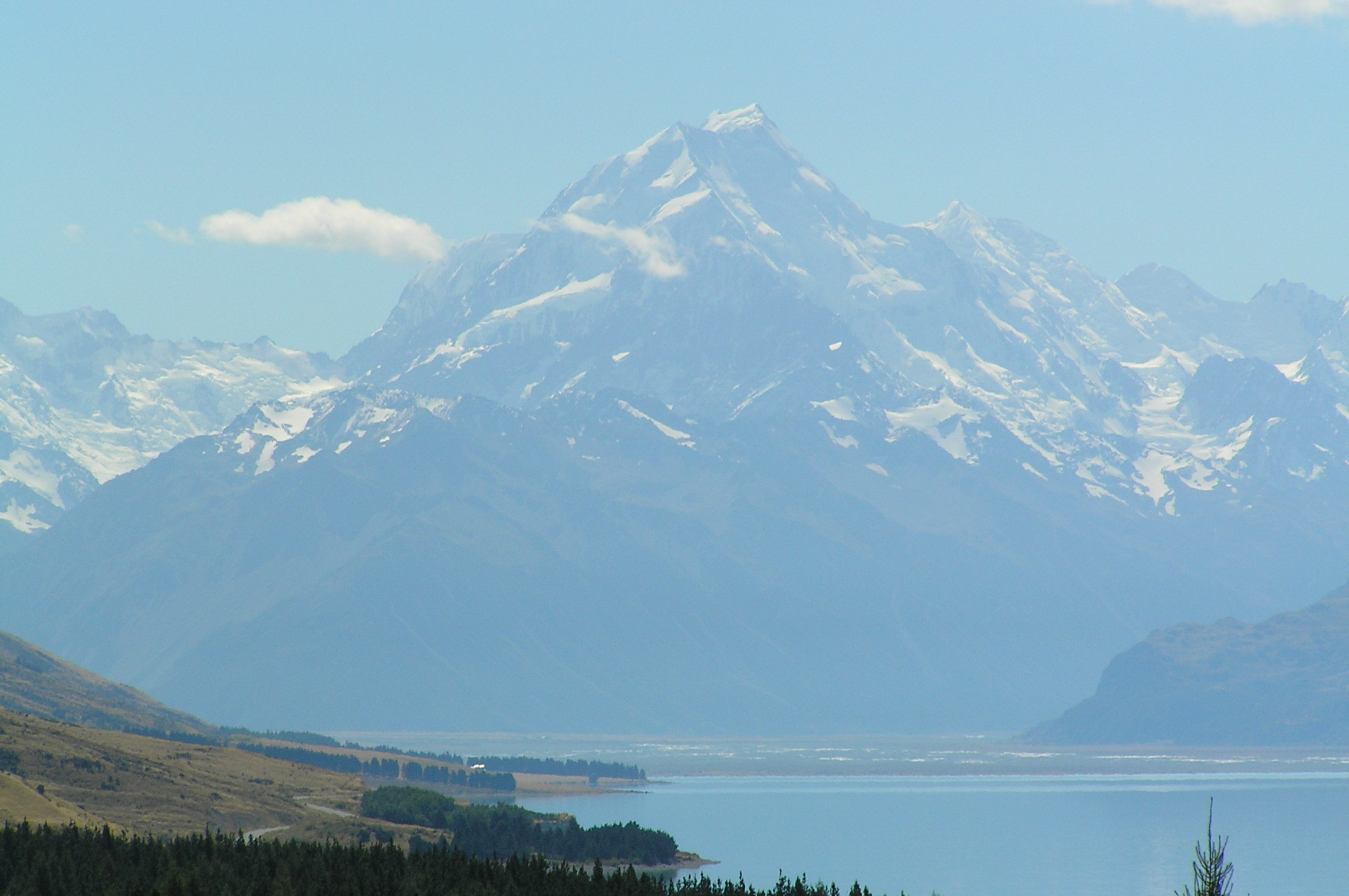 Vista de Aoraki/Mount Cook desde el Lago Pukaki View of Aoraki/Mount Cook from the shore of the Lake Pukaki Author: Mr. Tickle Date: March, 2005